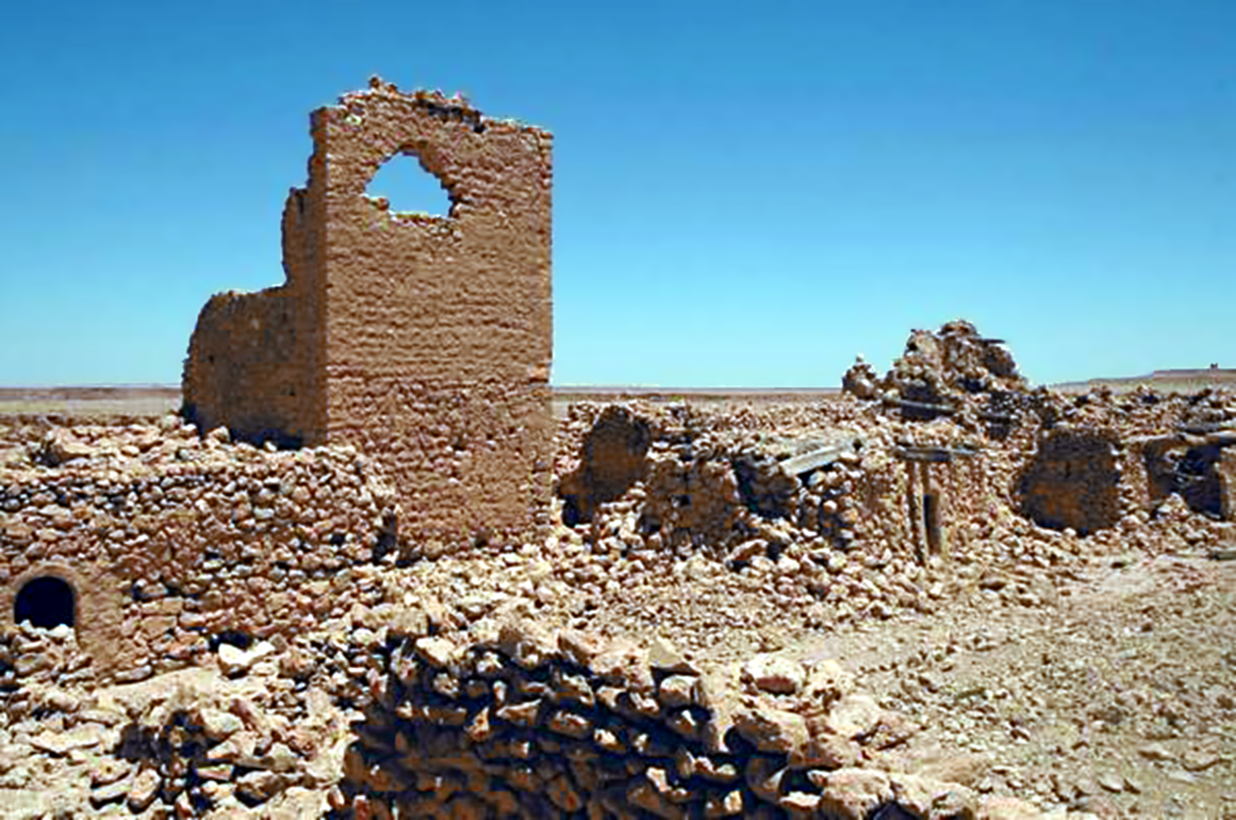 Kastell Gheriat el-Garbia - Zwischenturm 2, Photo aus dem Lagerinneren